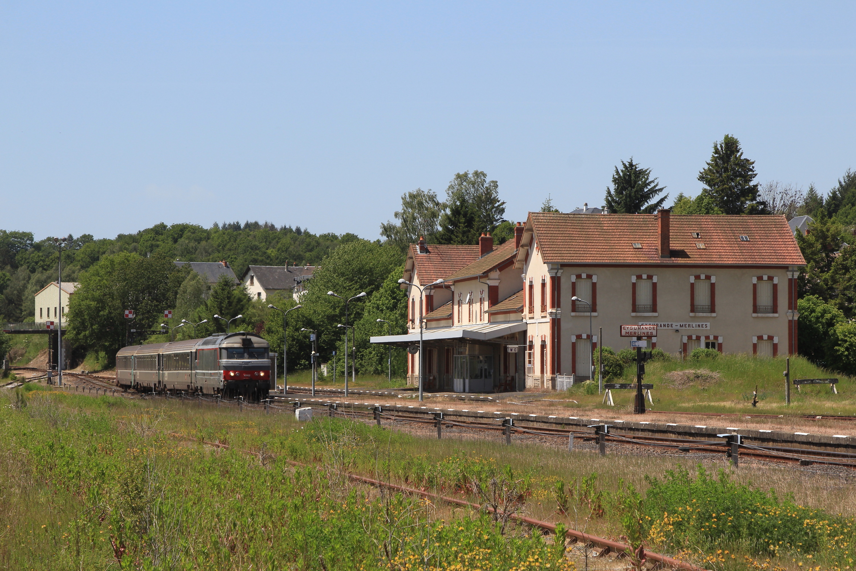 L'Intercité n°4492 (ex-Ventadour) composé de 3 voitures Corail et tiré par la BB 67432 en livrée multiservice marque l'arrêt en gare d'Eygurande - Merlines.